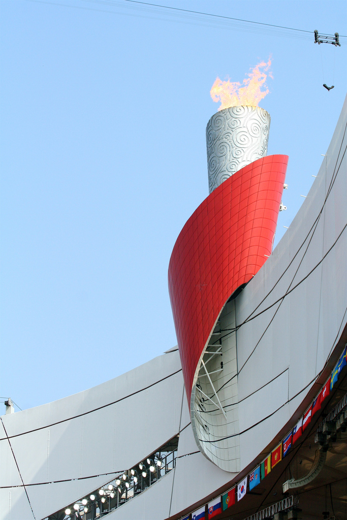 Beijing National Stadium Torch